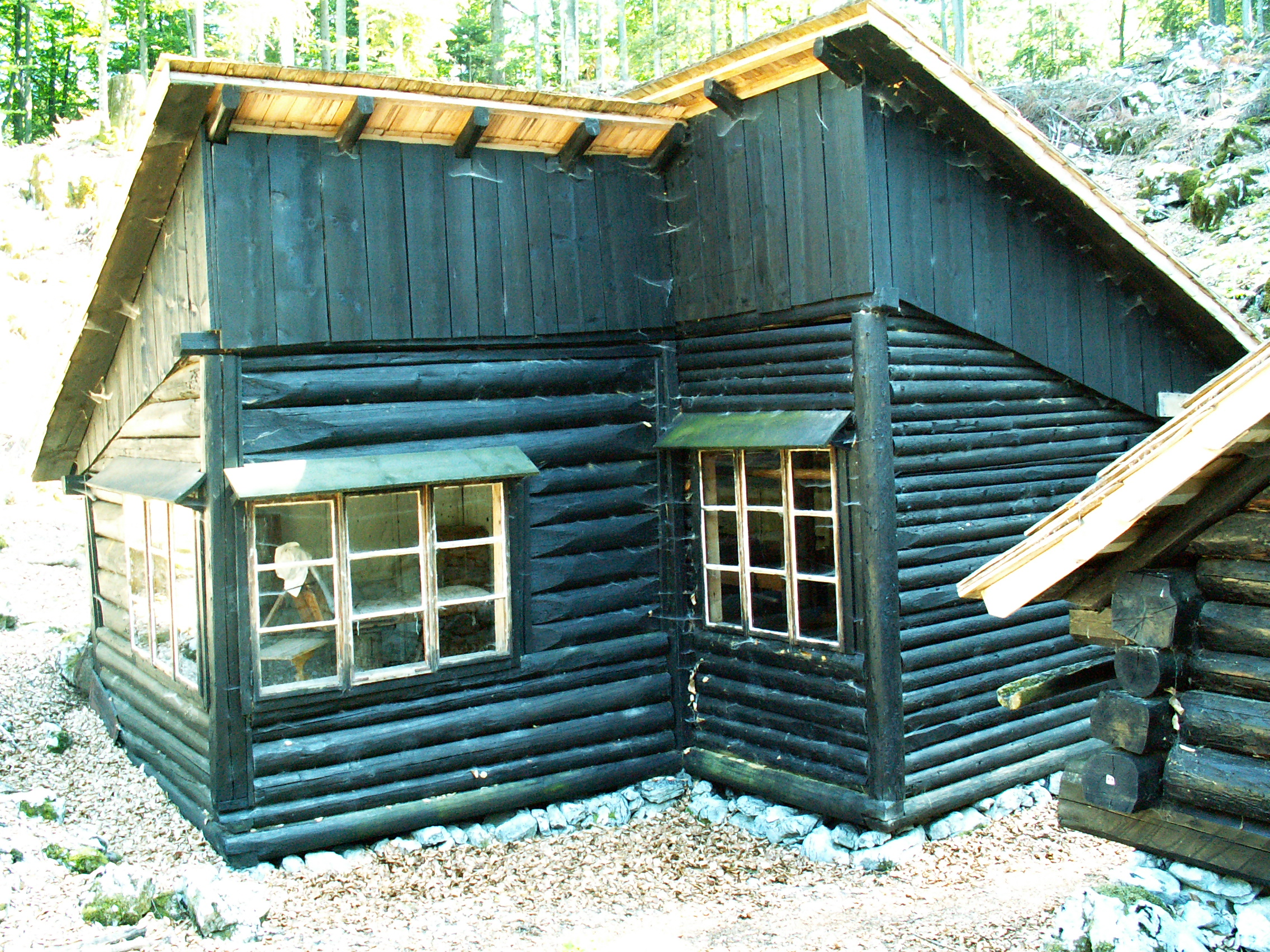 A septic operating barrack in Zgornji Hrastnik partisan hospital in Kočevski Rog, Slovenia